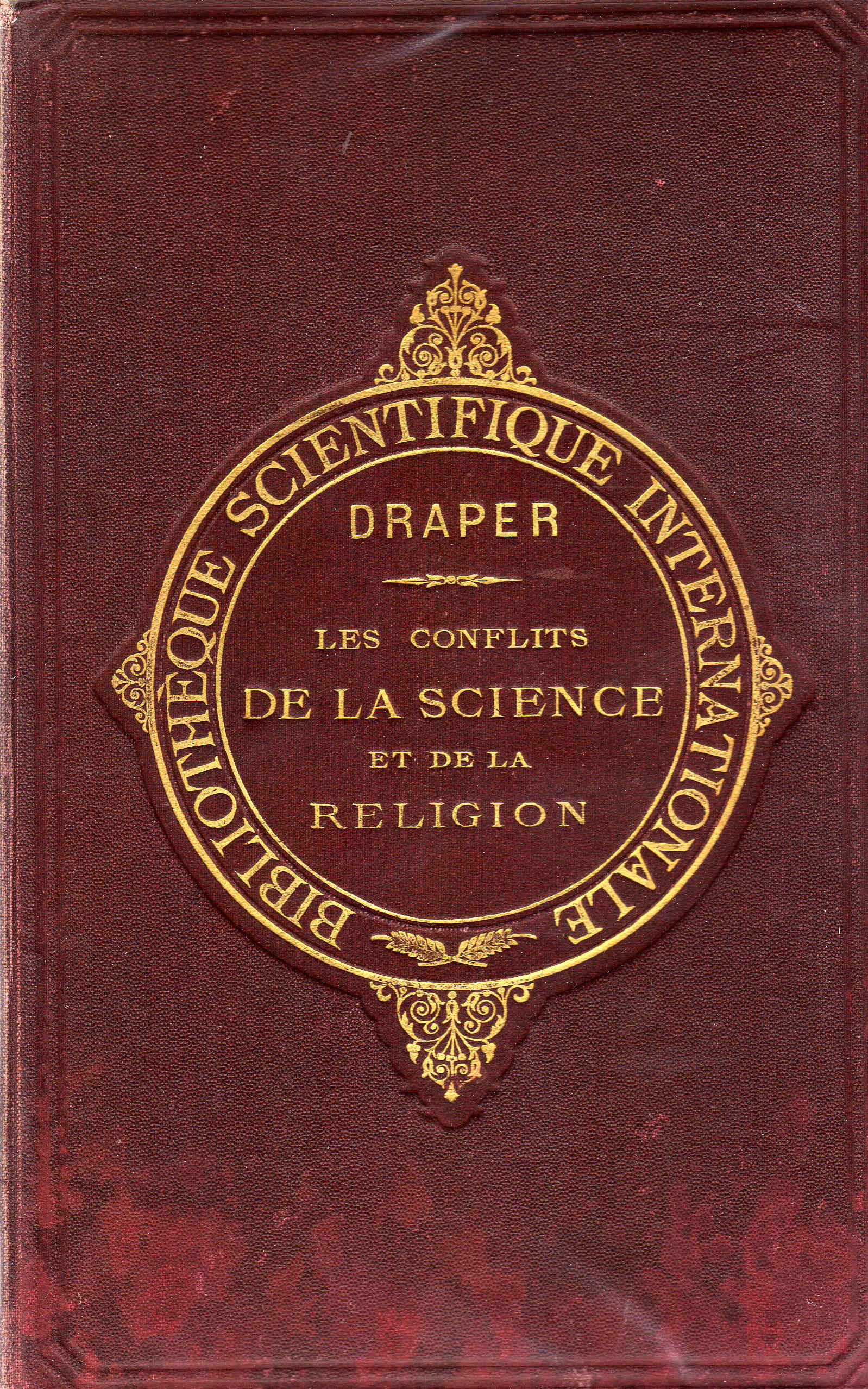 Couverture du livre de J.W. Draper : Les conflits de la science et de la religion. Edition française de 1903.